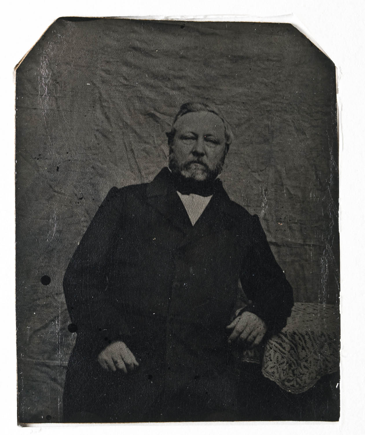 Porträtt av äldre herre med slätkammat hår, mustasch och skepparkrans, knäbild, sittande. Iklädd svart knäppt rock, vit skjorta, svart halsduk och svarta byxor. Vänster armbåge vilar på ett bord med mönstrad duk. Panotyp på skinnlapp utan ram. 1860-1880-tal. På skinnets baksida handskrivet med bläck, otydligt. Påklistrad pappersetikett med givaruppgifter. Nordiska museet inv.nr 191845